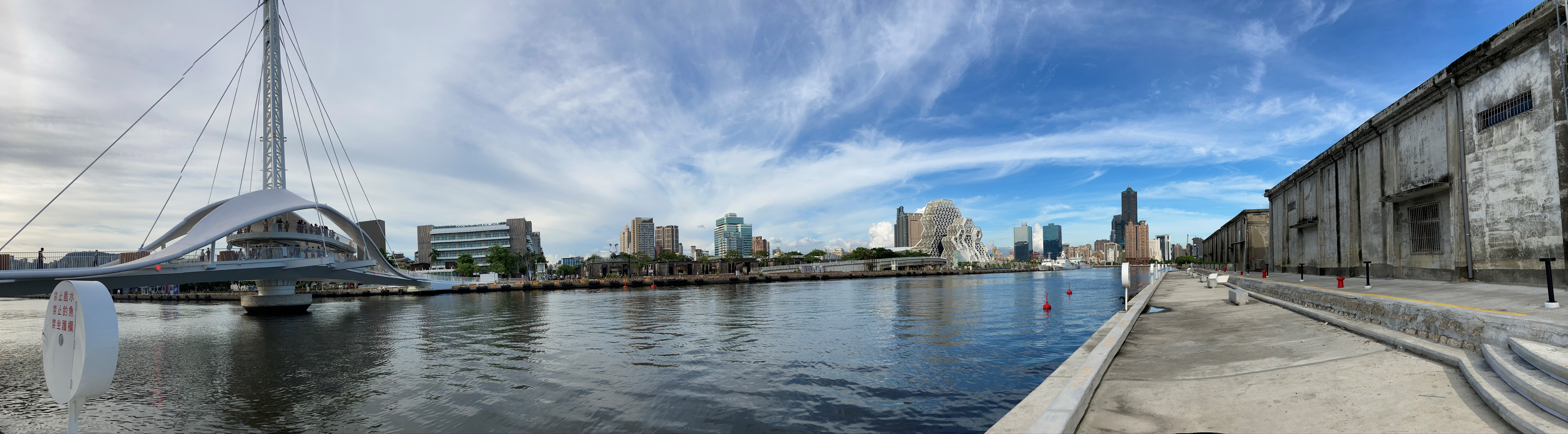 中文（台灣）: 大港橋與高雄水岸2020